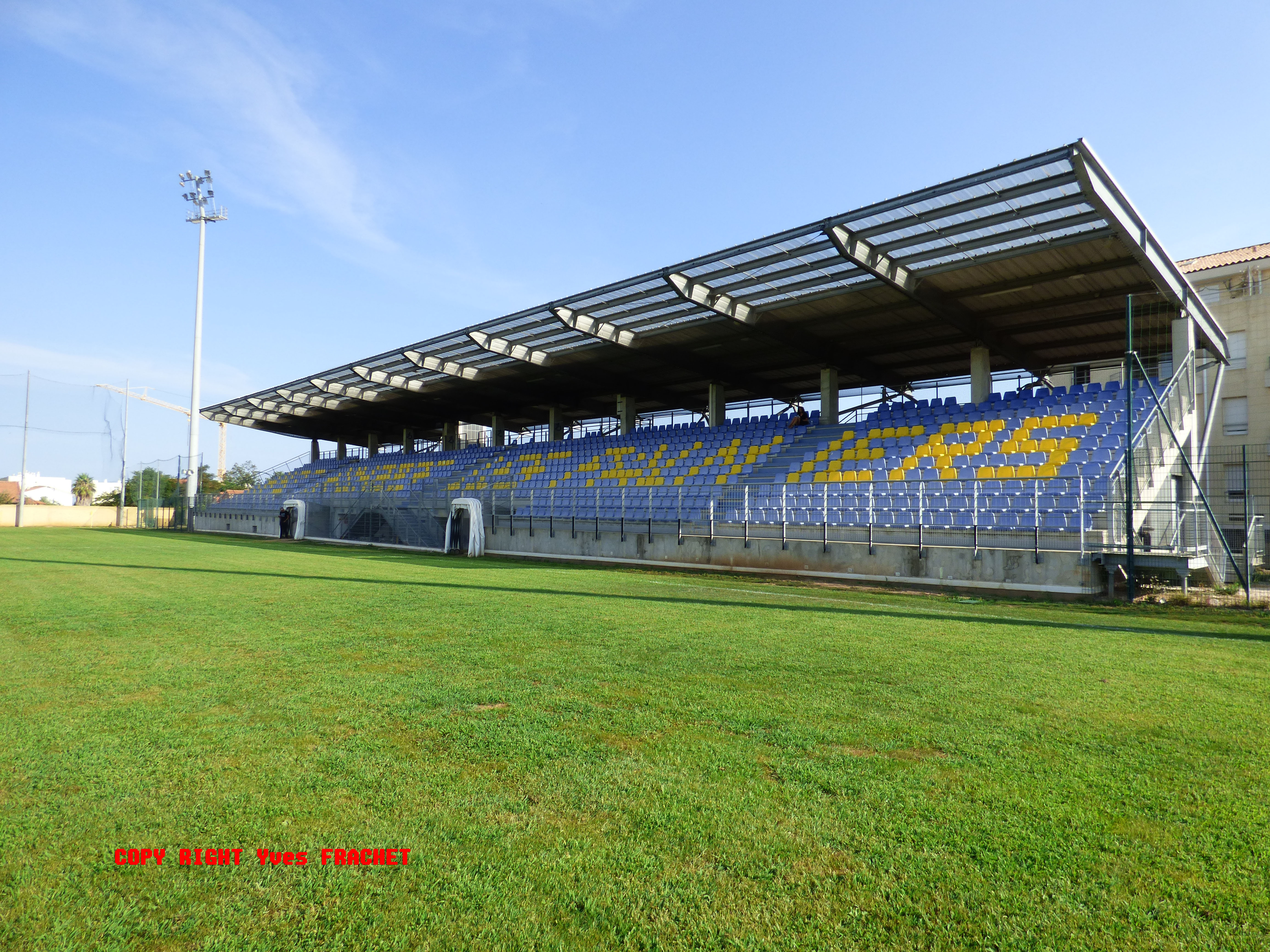 STADE PERRUC HYERES LES PALMIERS 83400